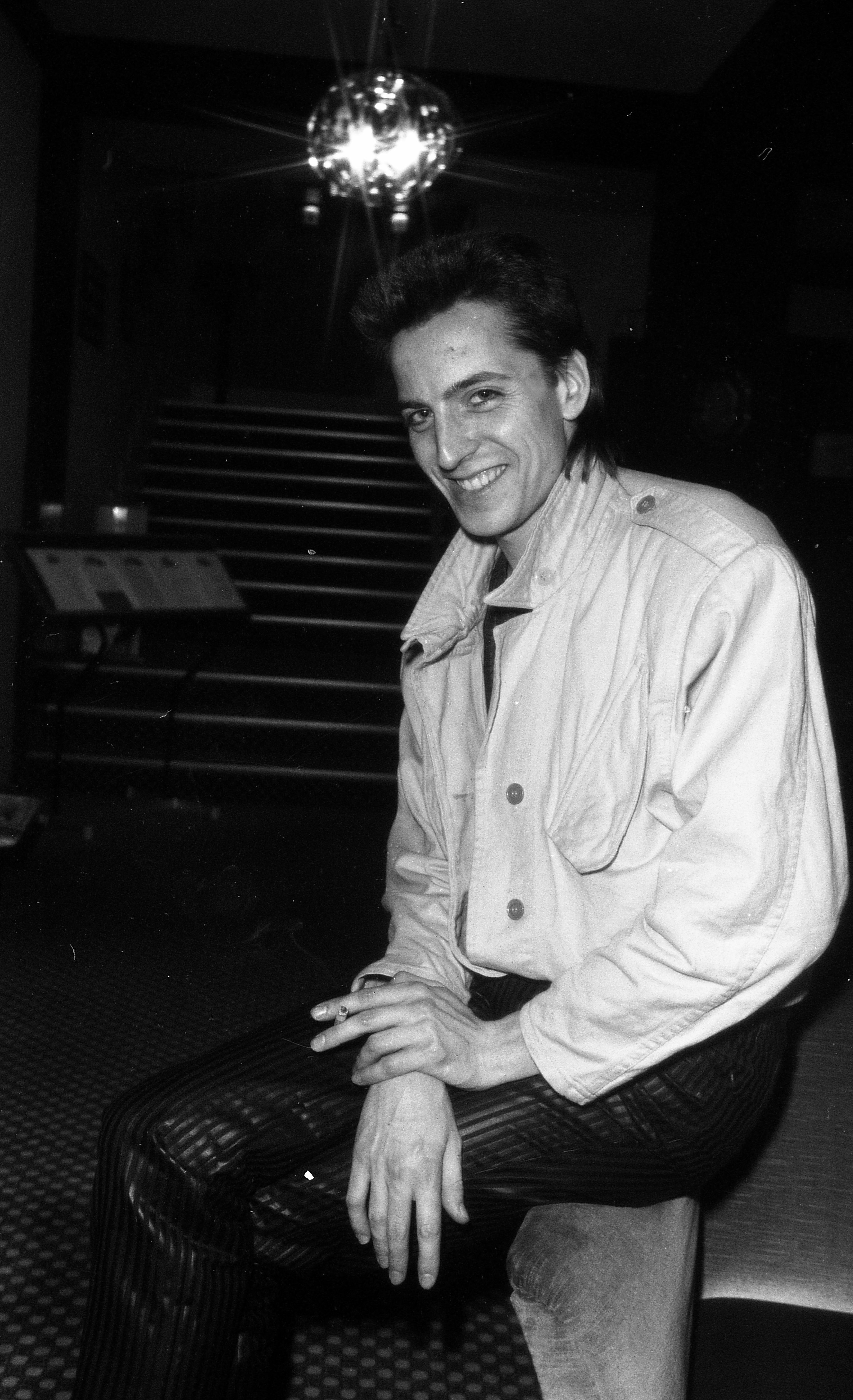 1984. Foto: Arve Juritzen. Arkivref.: PA-0797_U_11715_001_022